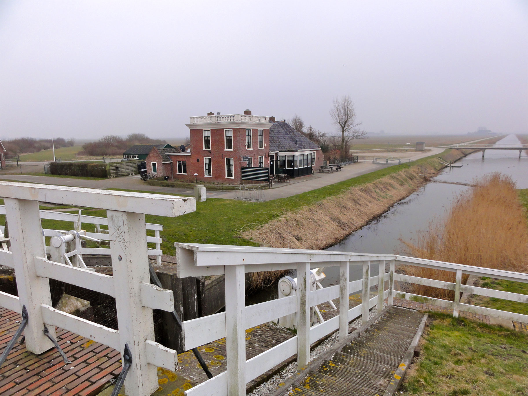 Zicht op Noordpolderzijl